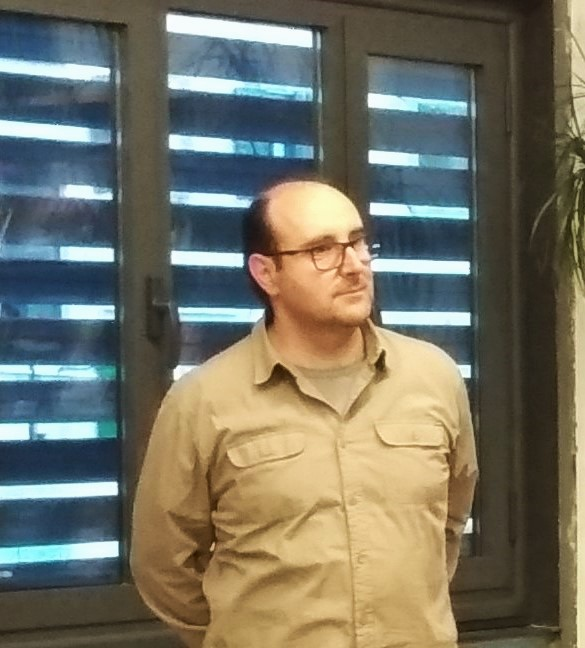 Ángel Alonso García, animazio zinema zuzendaria